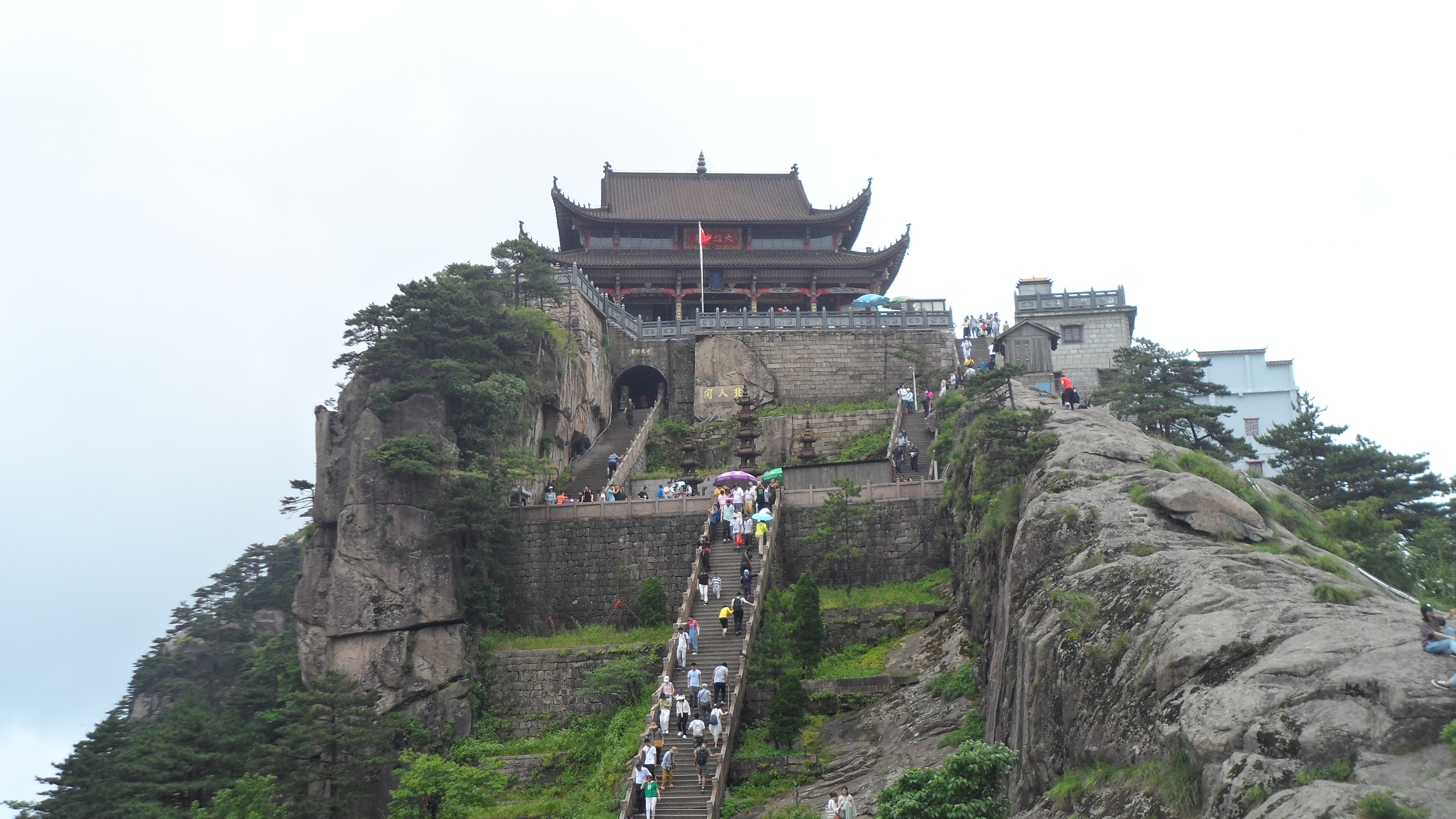 九华山天台